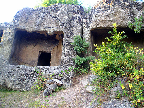 Bilgi GÜVERCİNLİK KAYA MEZARLARI |açıklama= Güvercinlik kaya mezarları.(Mağara Önü) |kaynak= kendi çektiğim fotoğraf |tarih= 2006 |yazar= ALİ RIZA BAŞOL |izinler= |diğer_sürümler=